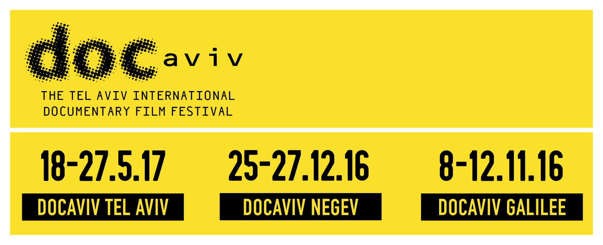 הפסטיבלים של דוקאביב לשנת 2017